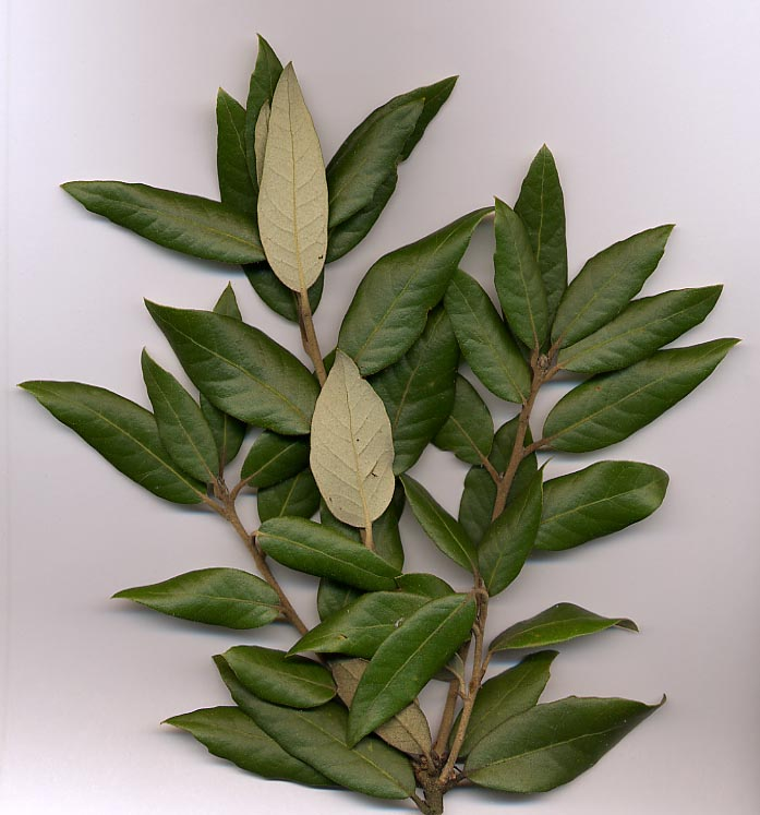 Quercus ilex foliage